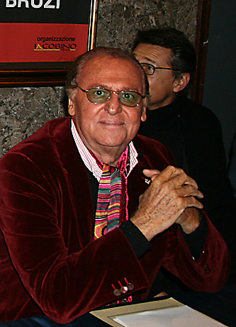 Renzo Arbore